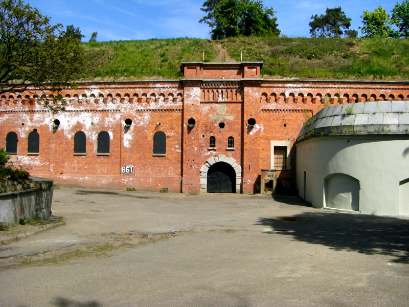 Fort I Twierdzy Toruń - brama wjazdowa